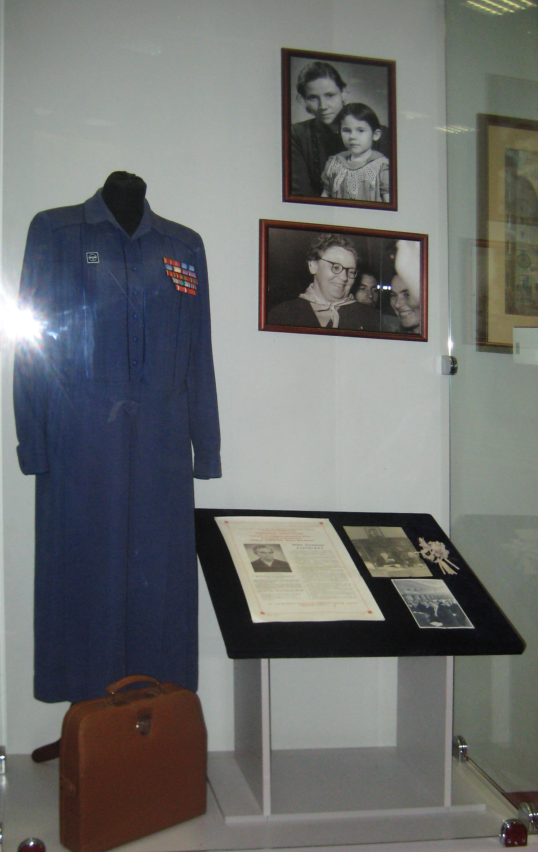 Музей Москвы (Провиантские склады)